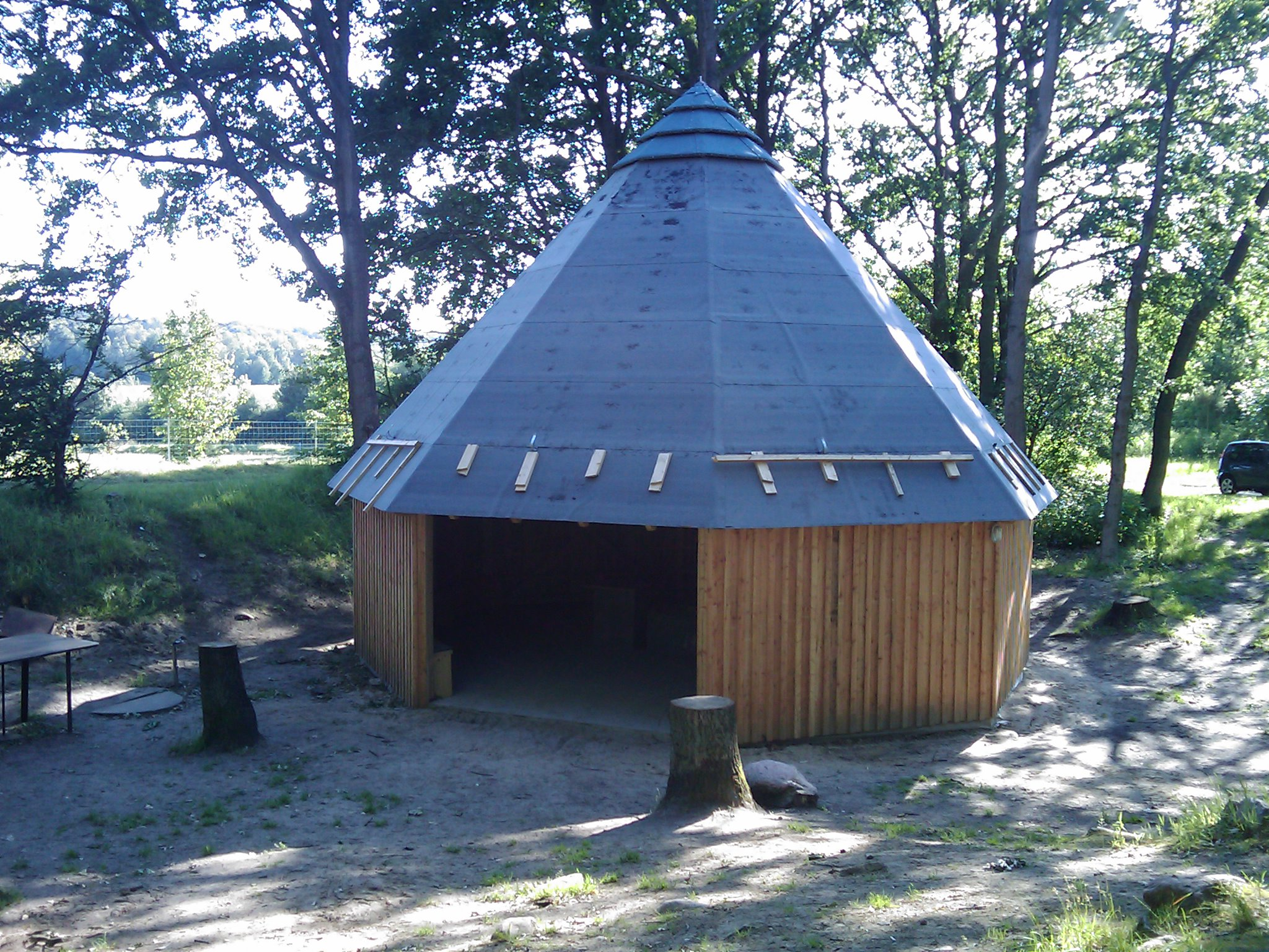 Köhlerhütte Helmstorf Seevetal Deutschland